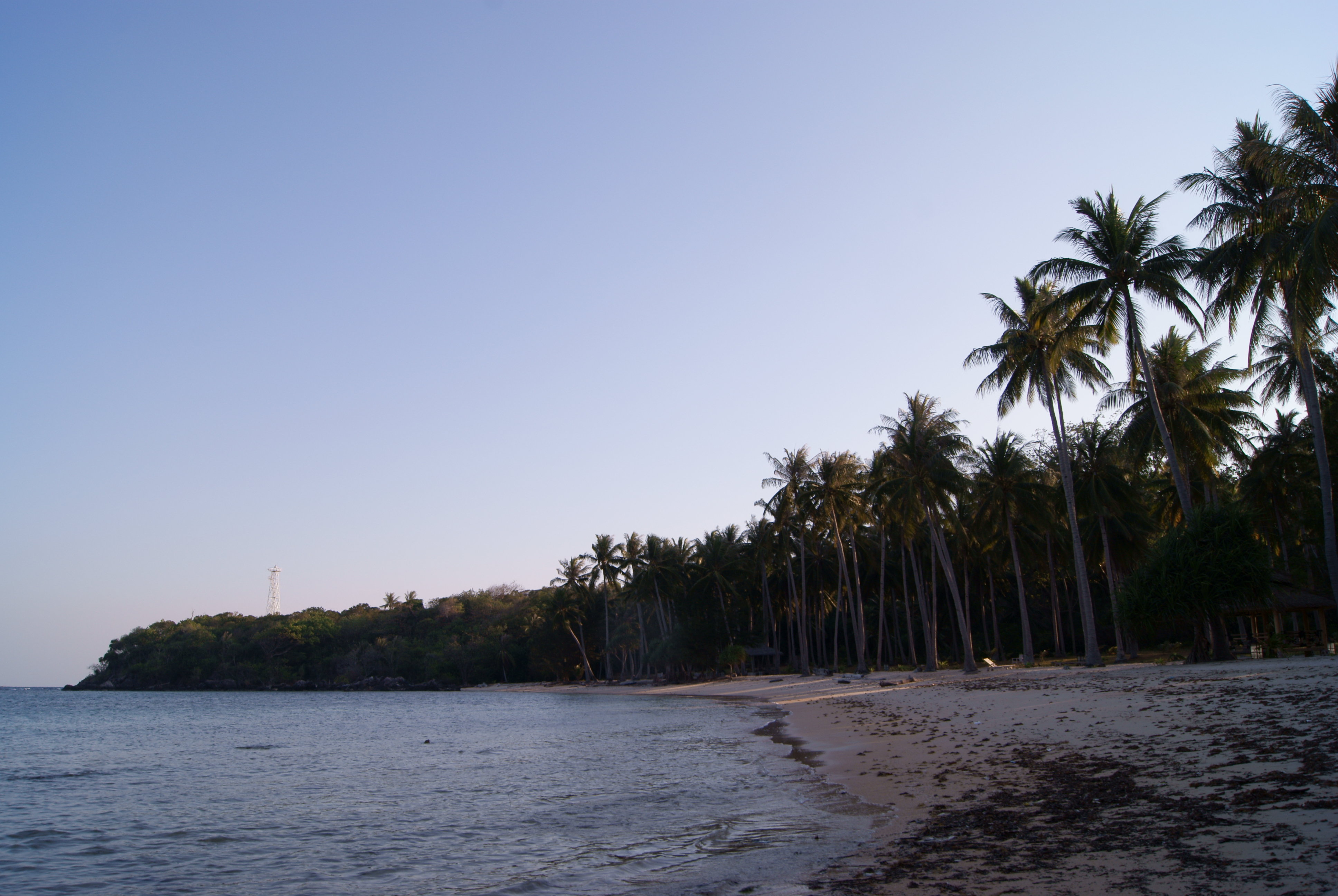 Nirwana Beach, Karimun Jawa